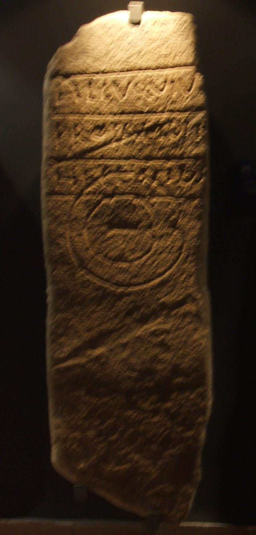 En Ibahernando (Cáceres) se halló esta estela de granito, con dibujos grabados de un escudo, una espada y una lanza. Está datada en la Edad del Bronce (siglos IX-VIII aC.) y se reutilizó en época romana con la inscripción siguiente:"Alluquiu(s)/Protacidi.f(ilius)/hece.situs" (traducible como:"Alluquio, hijo de Protacido, aquí yace").